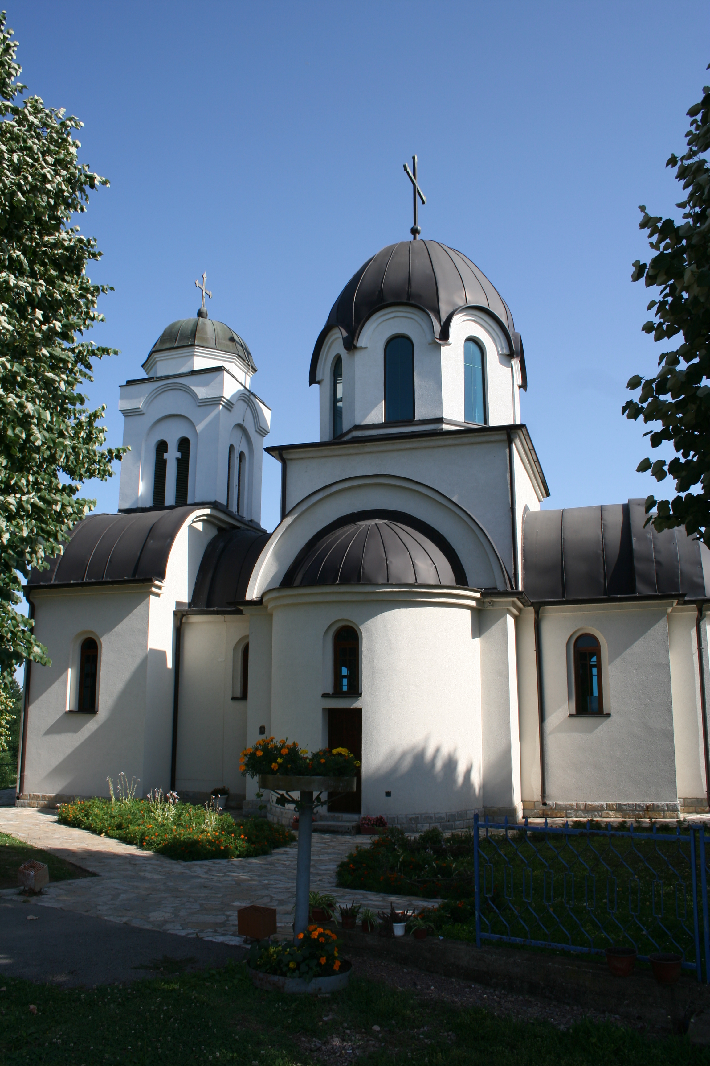 Crkva Sabora Sv. arhangela Gavrila, Vrtiglav